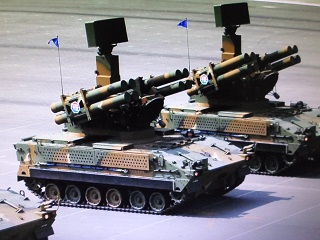 두산 천마